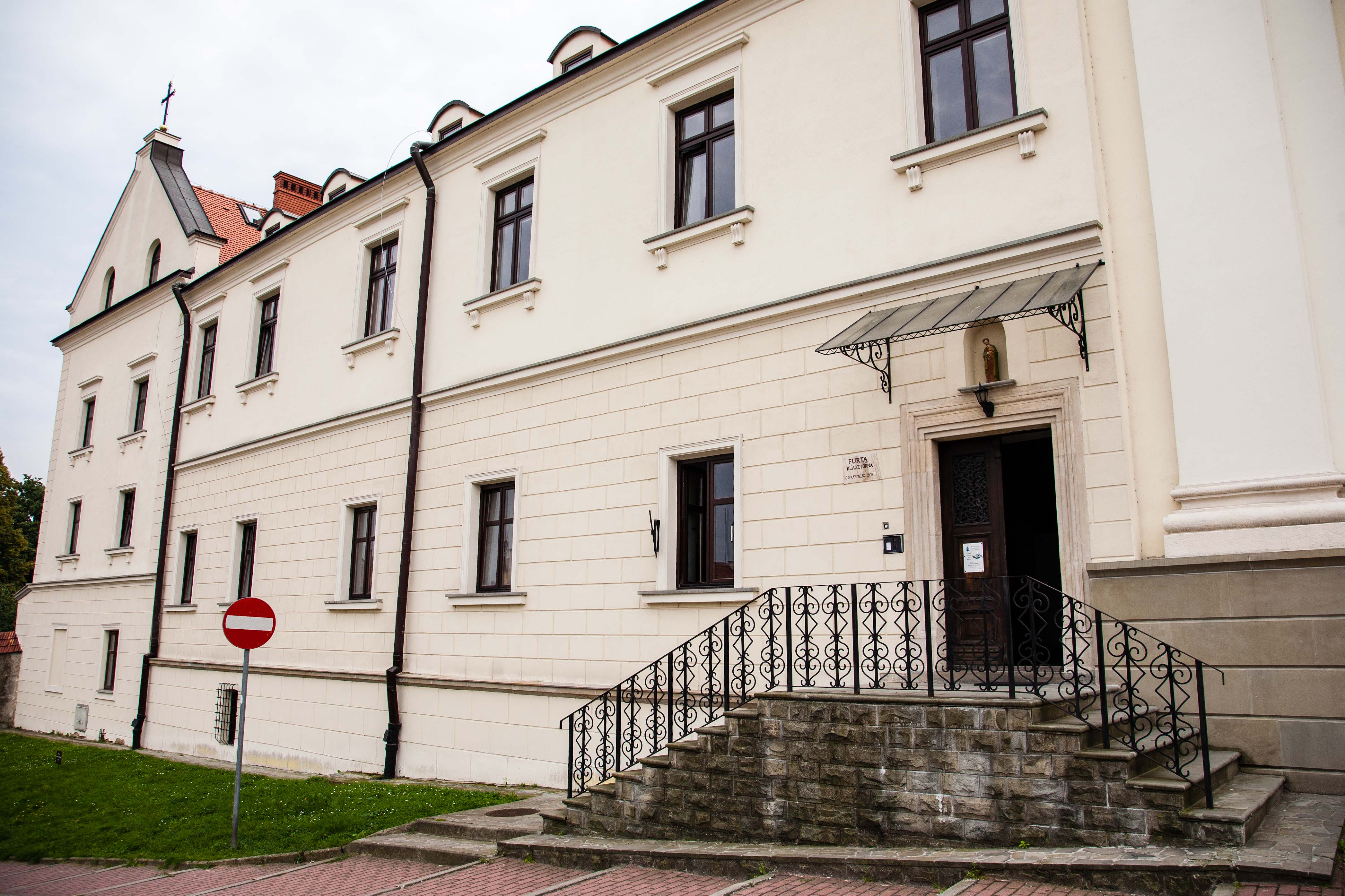 zespół klasztorny karmelitów bosych Kościół p.w. św. Teresy, mur., 1627-1630, 1866, 1996 Klasztor, mur., 1623-1636, XVIII, 1874-1884 Przemyśl, ul. Karmelicka 1, Przemyśl 03.1952.